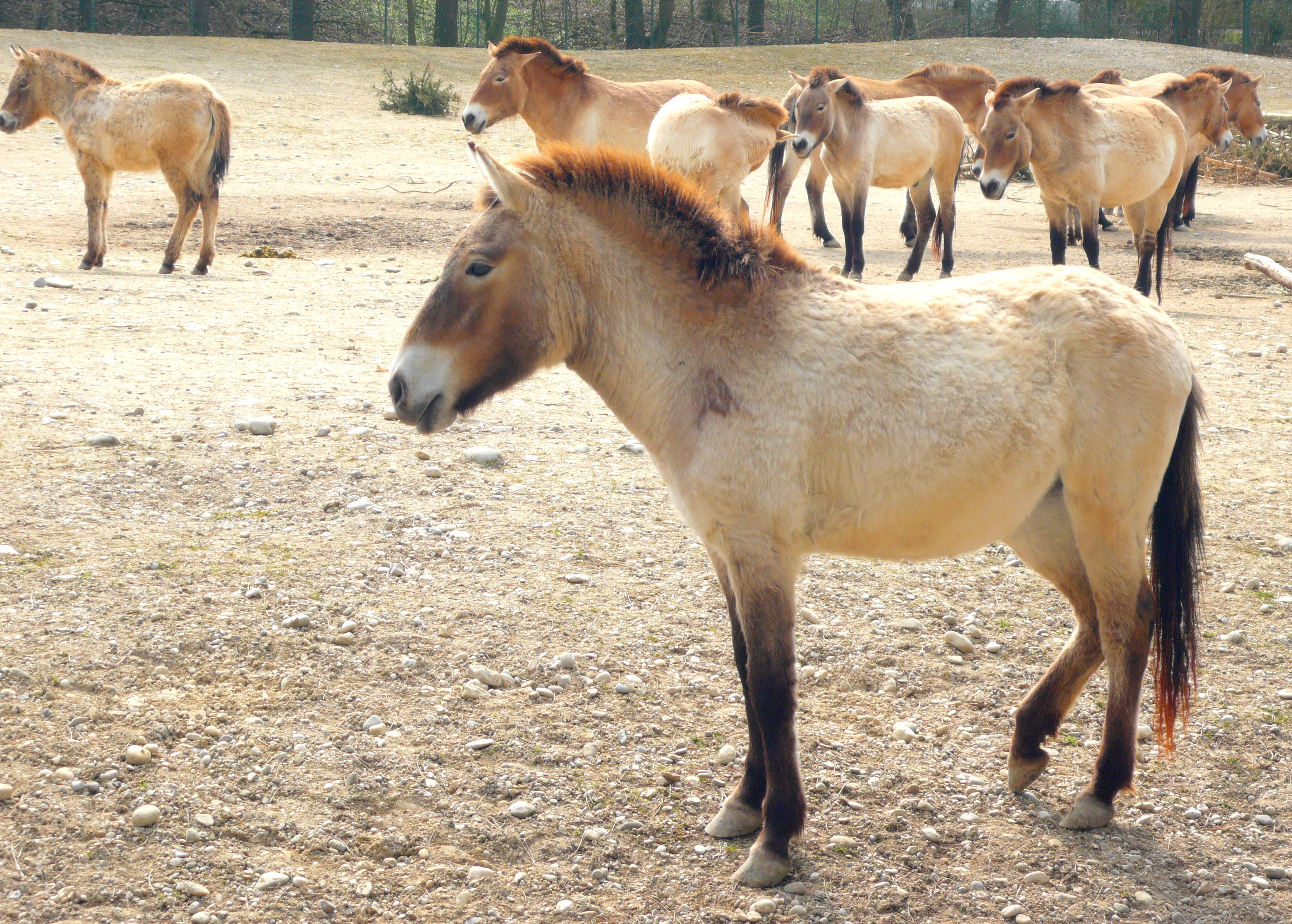 Przewalski horses